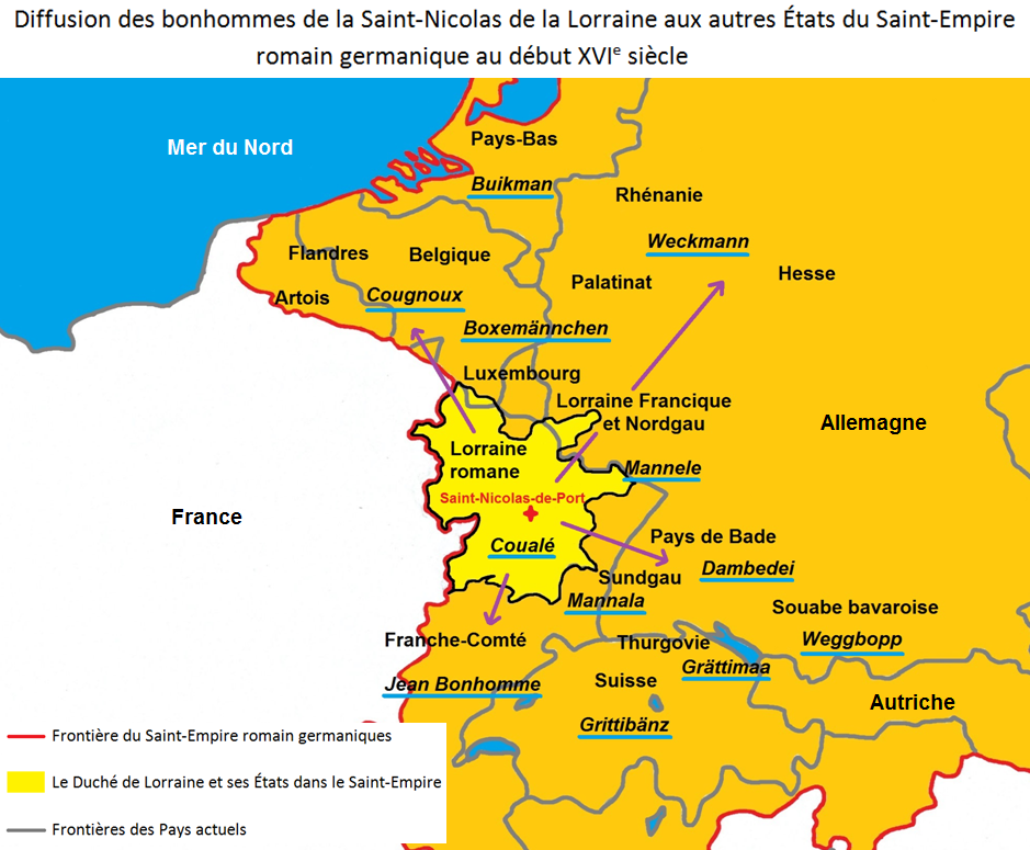 Diffusion des bonhommes de la Saint-Nicolas de la Lorraine aux autres États du Saint-Empire romain germanique au début XVIe siècle